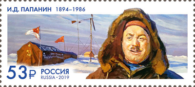 Почтовая марка России, выпущенная 19 ноября 2019 года и посвящённая 125-летию со дня рождения И. Д. Папанина. На марке представлен его портрет и изображение станции «Северный полюс-1». Художник — С. Ульяновский. Тираж — 96000 экз. Номер по каталогу ЦФА — 2572.